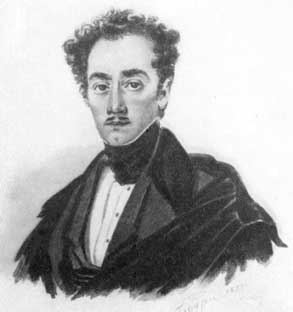 Александр ВЕЛЬТМАН. Акварель К.-Ф. П. Бодри, 1839 год